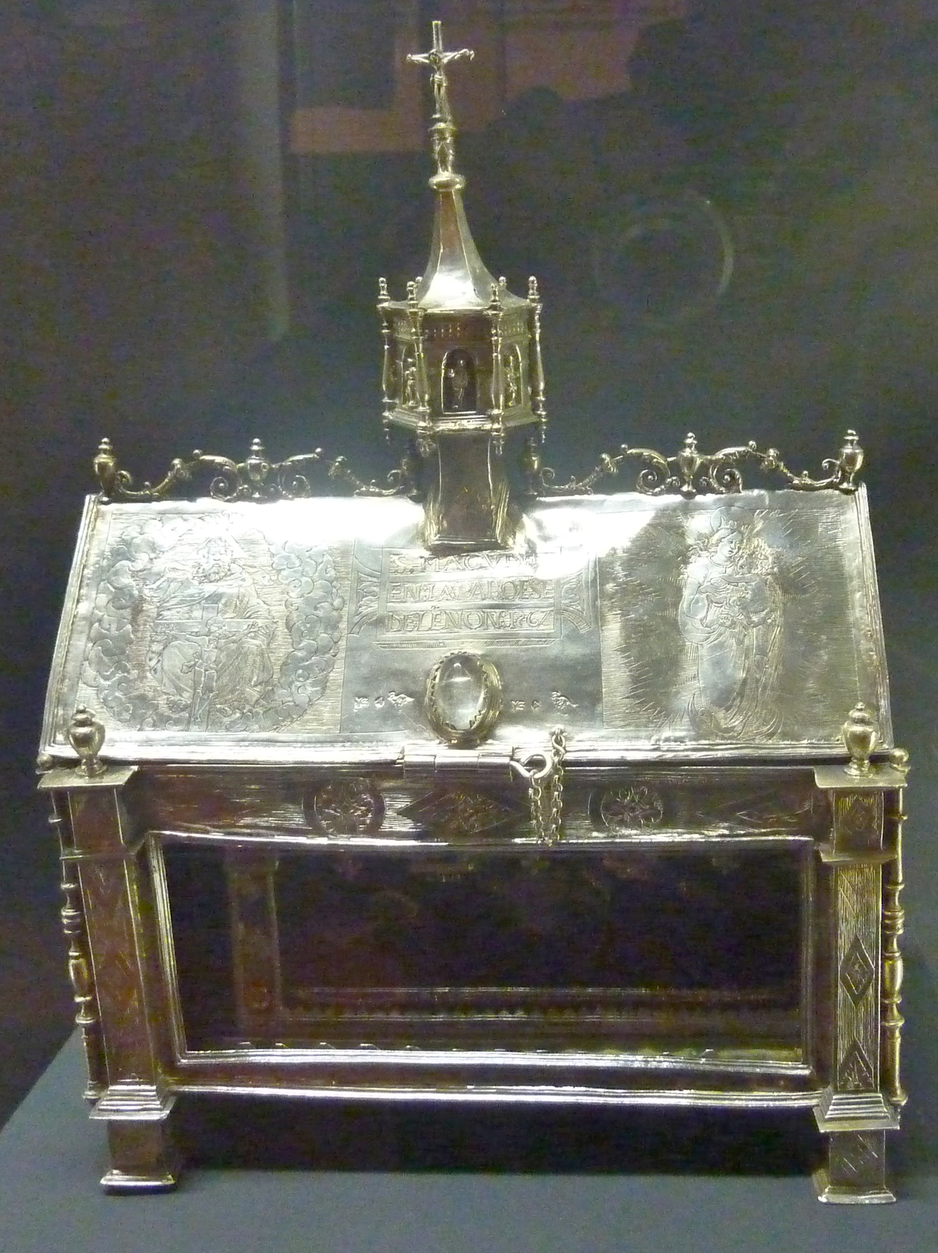 Lennon : reliquaire de Saint-Maudez (en argent et daté de 1567). Ce reliquaire présente une façade vitrée et son décor adopte des pilastres, balustres et feuillages typiques de la Renaissance. La Vierge à l'Enfant et la Trinité gravées sur son toit évoquent des gravures de Dürer.